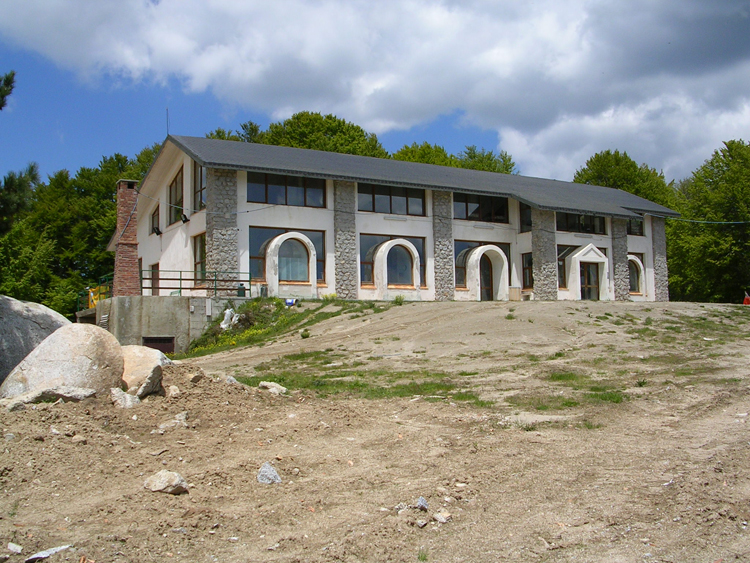 Rifugio Carlomagno realizzato dalla Comunità Montana Silana